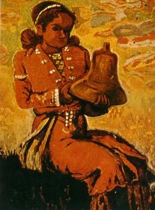 Sayun